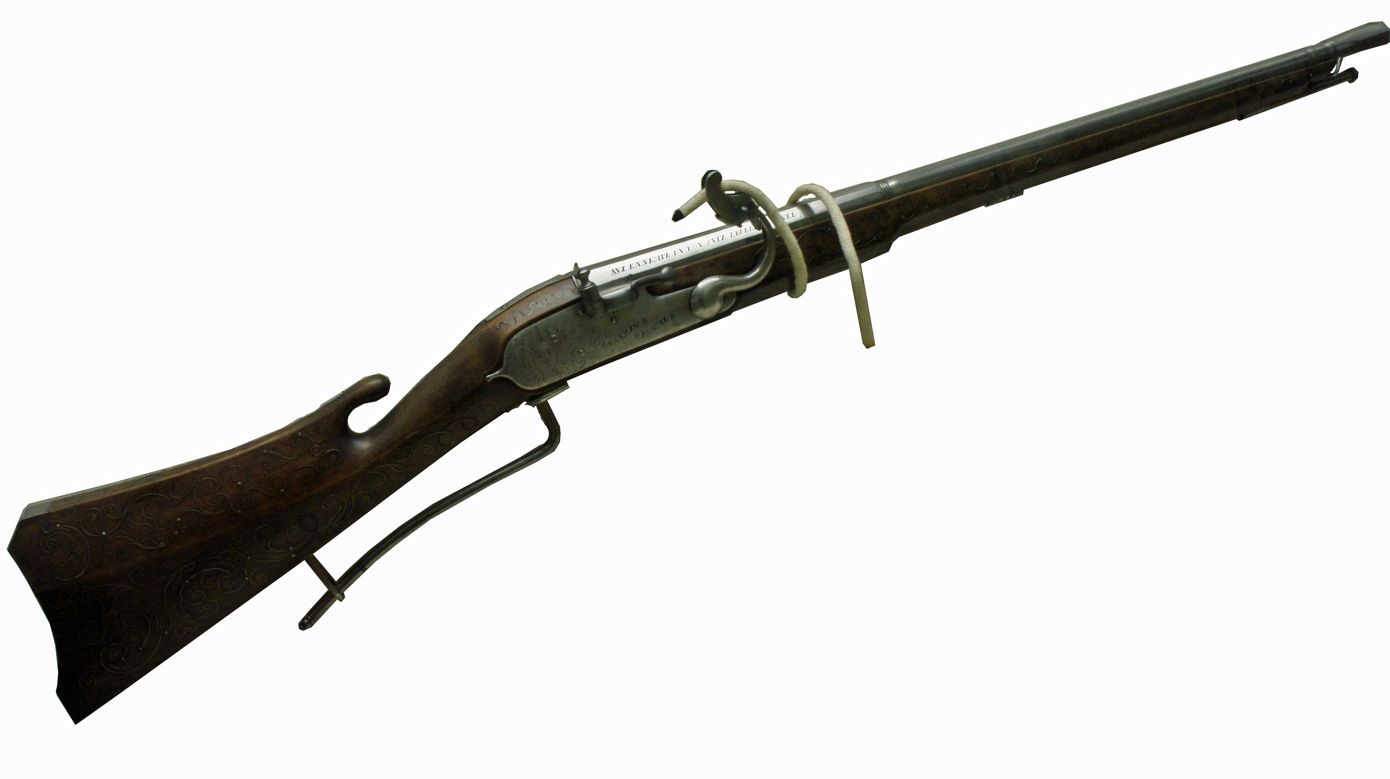 Mousquet à mèche de la deuxième moitiée du XVIIe siècle. Dans la salle militaire du musée st-Remi de Reims. Sur la platine : magazin royal, sur le canonpour maintenir la foy suiz belle et fidel mais aussi aux ennemiz du roy suiz rebelle et cruel.